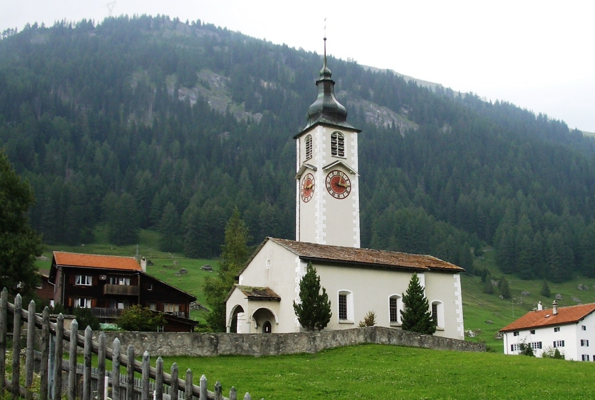 Sufers GR, Switzerland